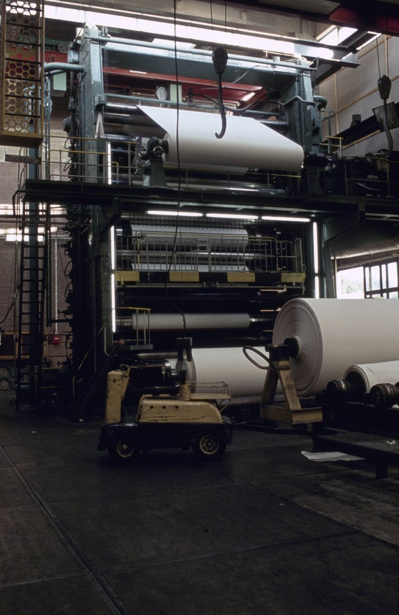 KONINKLIJKE PAPIERFABRIEK VAN GELDER EN ZOON: INTERIEUR, KALANDER